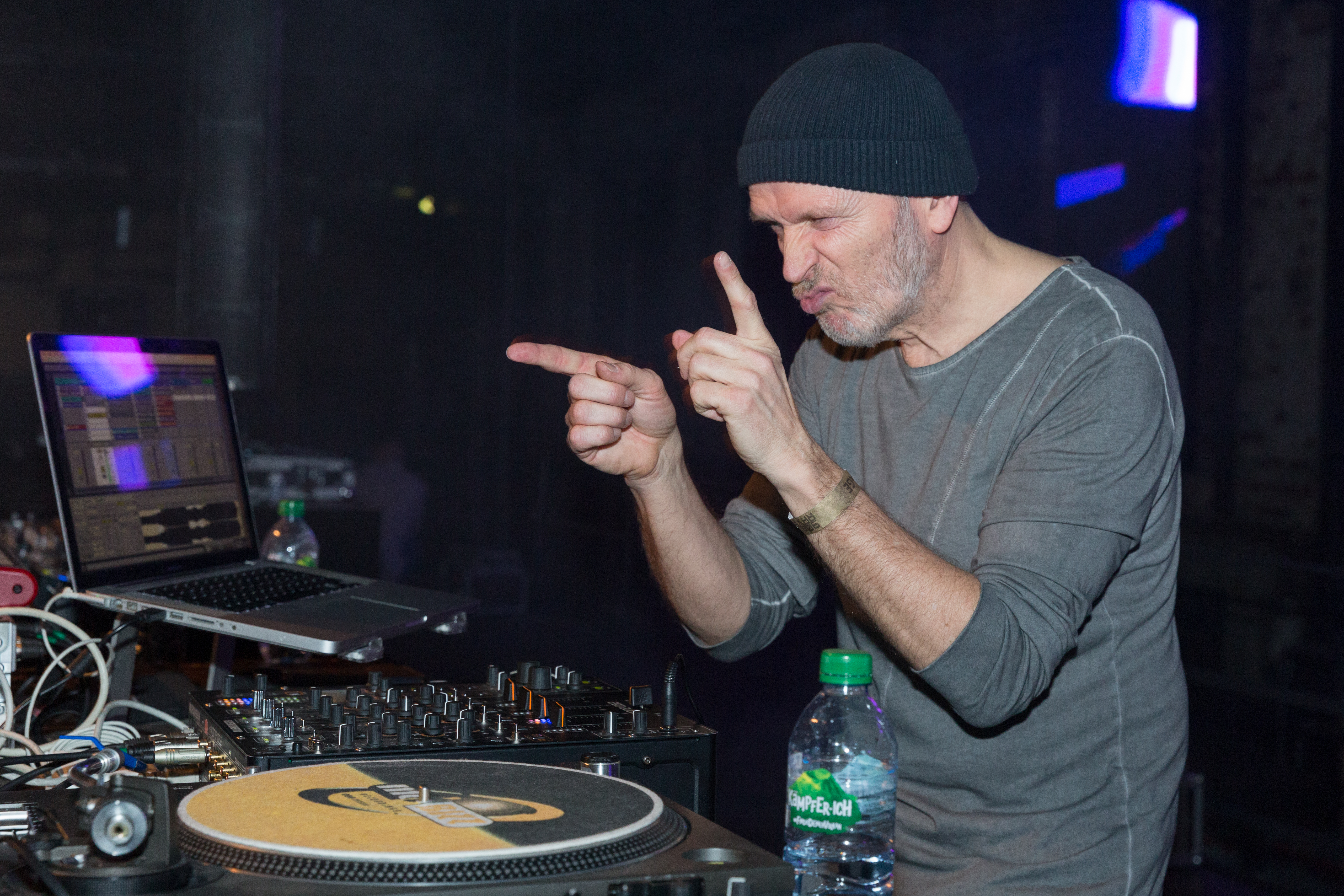 Jam & Spoon (aka Jam El Mar) auf dem 90er Rave, Festival für Technomusik der 90er Jahre. Die Veranstellung fand in der Arena Berlin am 11.02.2017 statt. Dieses Bild wurde mit zustimmung und Akkeditierung des Veranstallter BM Eventagentur UG (haftungsbeschränkt) erstellt.